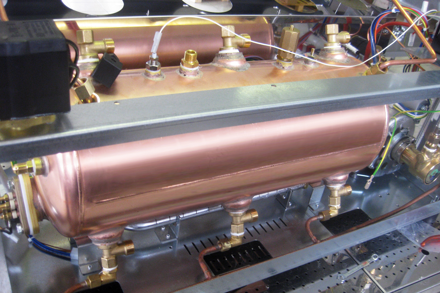 Kessel der Hybrid-Espressomaschine mit wahlweise Gas- oder elektrischer Beheizung.